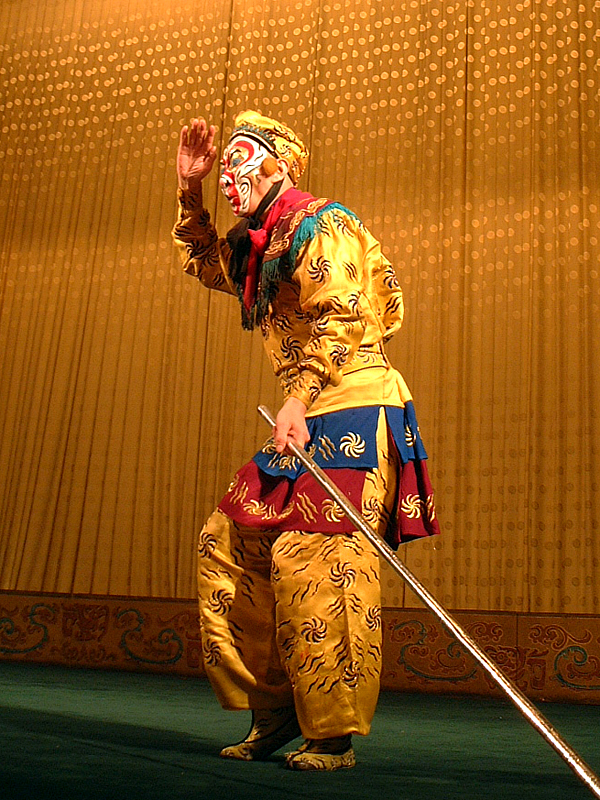 @Beijingオペラとか歌舞伎とかも含め、一度観てみたかった京劇。短いながら、覇王別姫と西遊記を観ることが出来ました。この写真は西遊記でのヒトコマで孫悟空です。ちなみに、席は舞台の真ん前。前にも席がありましたが人がいなかったので、途中から舞台まで寄って撮影しました。独特の表現や動き、衣装がとても興味深かったのですが、観たところのせいか、思ったより華がない感じはしました。現代的な舞台をイメージしすぎたのかもしれません。Sun Wukong [Beijing]